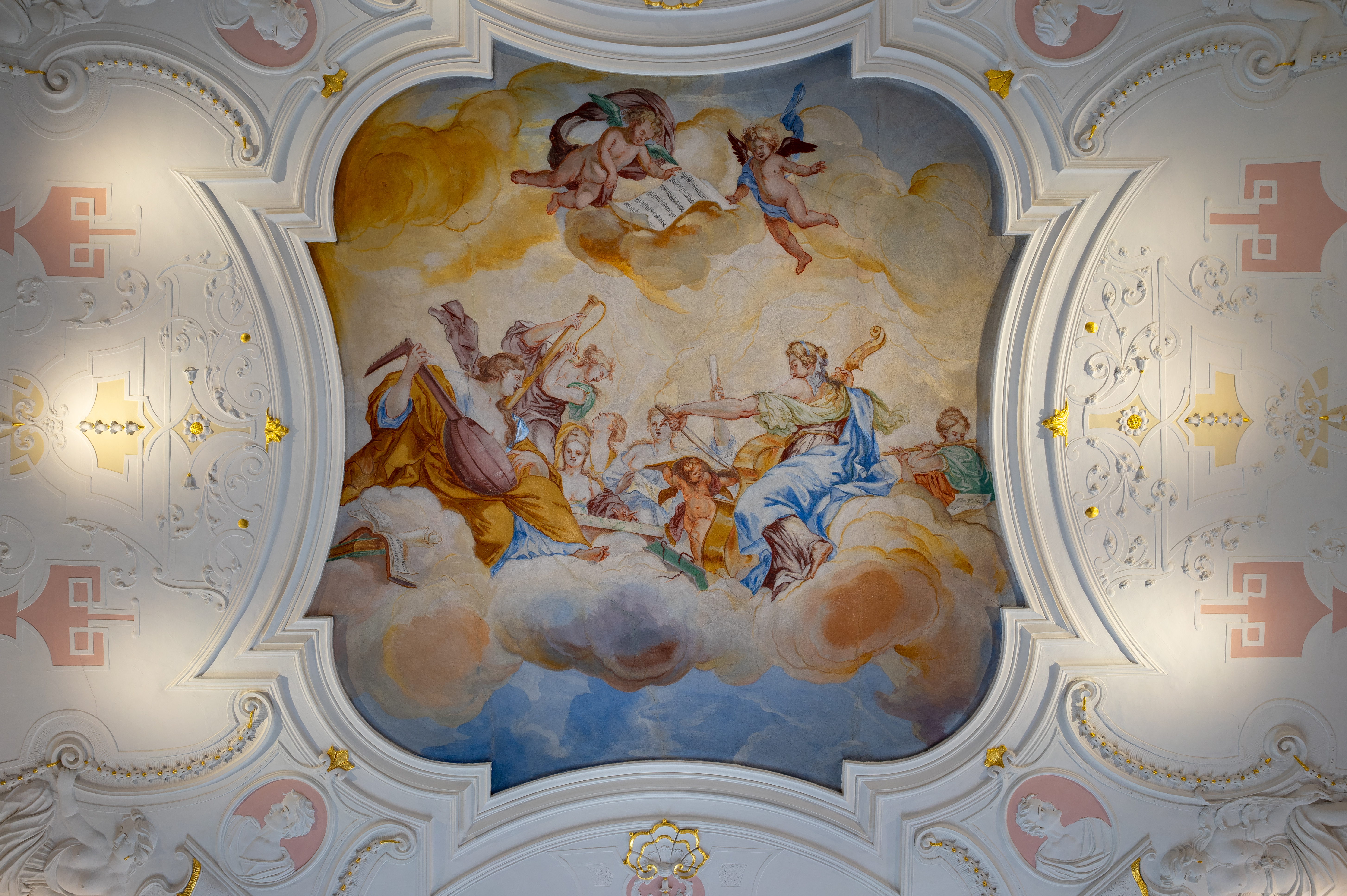 Schwäbisch Hall: die um 1740 freskierte und stuckierte Decke des Musiksaals im dritten Obergeschoss der Keckenburg (Untere Herrngasse 10), heute Teil des Hällisch-Fränkisches Museums. Das zentrale Fresko stellt allegorisch die Musik dar. Hinweis 1: Die Aufnahme ist nicht symmetrisch, weil auch die Stuckierung der Decke selbst nicht symmetrisch ist. Daher war es nicht möglich, eine Position für die Kamera zu finden, welche die Decke symmetrisch darstellt, und eine künstliche Entzerrung der störenden Asymmetrie am Computer halte ich für unangebracht, eben weil die Stuckierung tatsächlich asymmetrisch gestaltet ist. Diese Version der Aufnahme ist aber etwas gedreht, damit sie zumindest gerader wirkt (ganz konsistent ist das wegen der Asymmetrien in der Decke nicht möglich); dafür musste die Aufnahme leider weiter beschnitten werden. Hinweis 2: Die Farben des Freskos sind im Original tatsächlich recht kräftig, ich habe sie nicht künstlich so gemacht. Eine ganz exakte Farbwiedergabe wäre natürlich nur möglich, wenn man eine Farbkontrollkarte an das Fresko halten mitfotografieren würde, aber ich habe versucht, die Wirkung des Freskos so wiederzugeben, wie sie in Wirklichkeit ist.